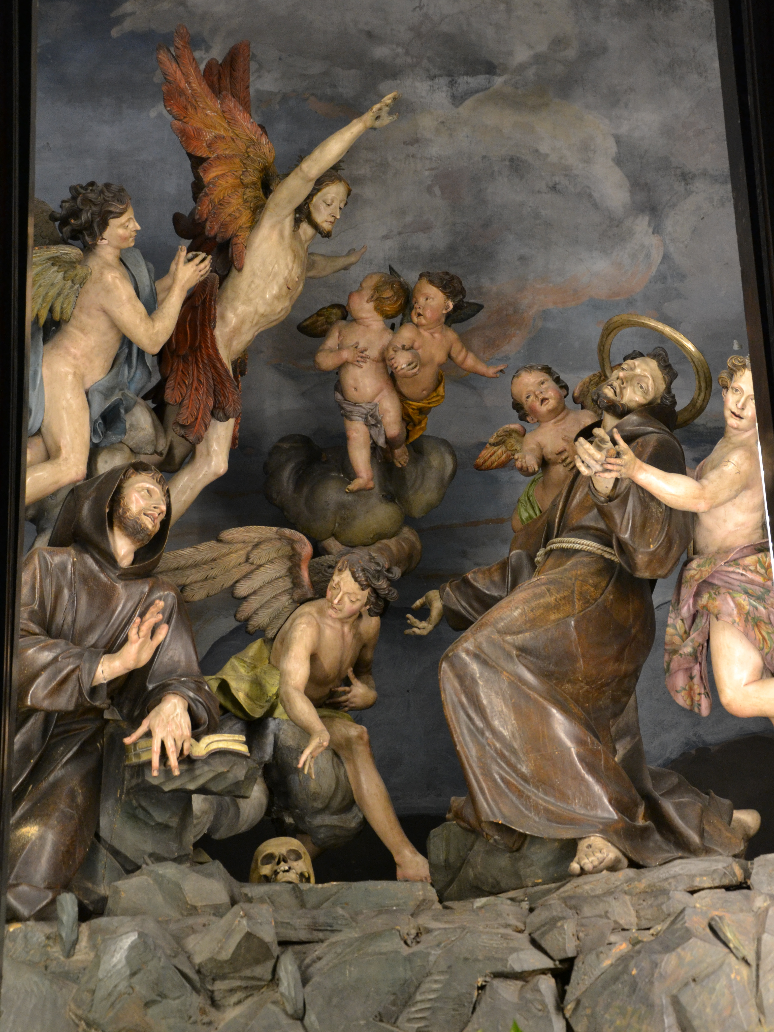 Gruppo scultoreo che rappresenta le Stimmate di San Francesco, Anton Maria Maragliano, 1708-1709 Chiesa della Santissima Concezione (Genova) conosciuta come chiesa dei Cappuccini o santuario del Padre Santo di Castelletto